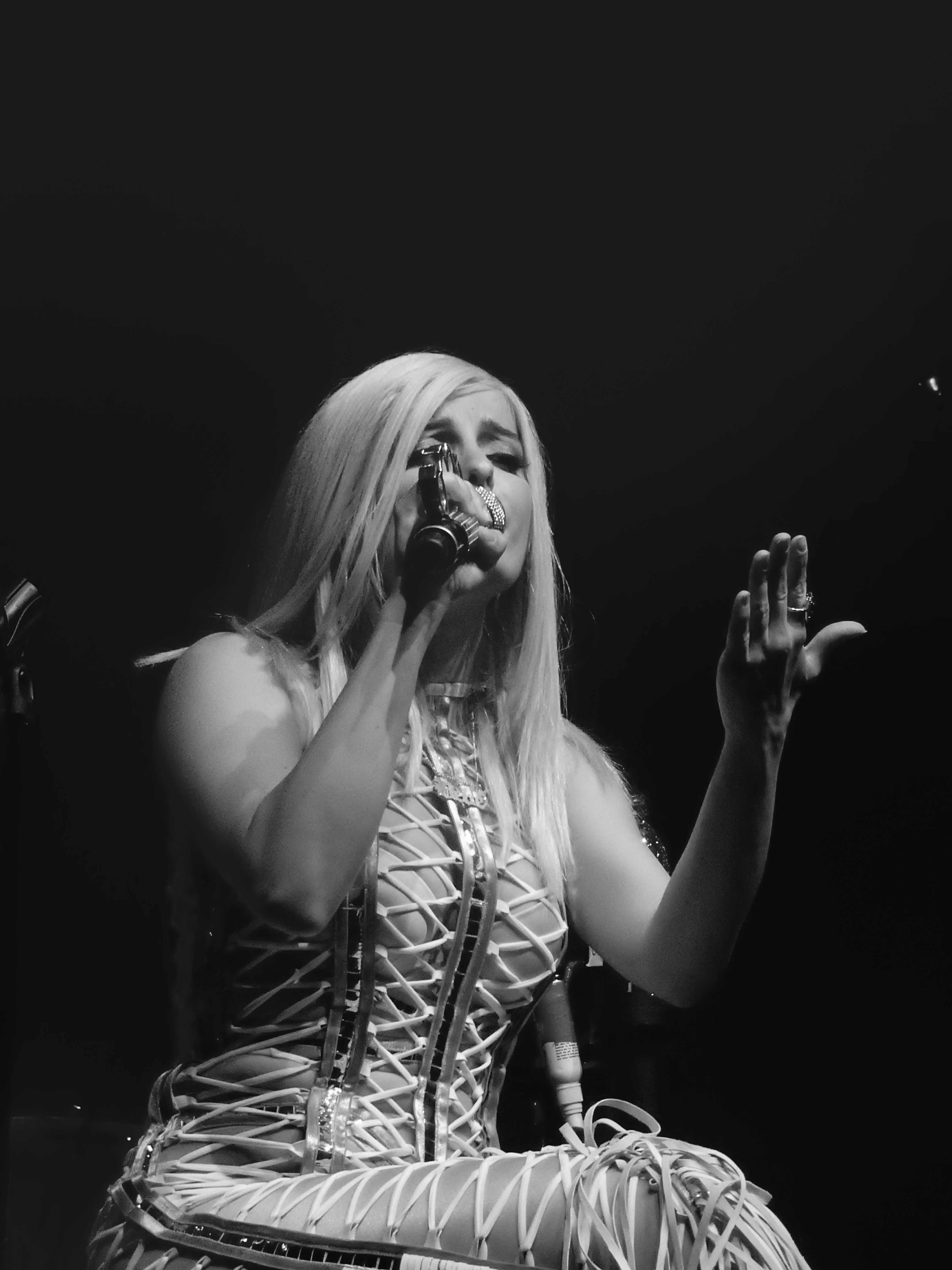 Bebe Rexha, Koko, London